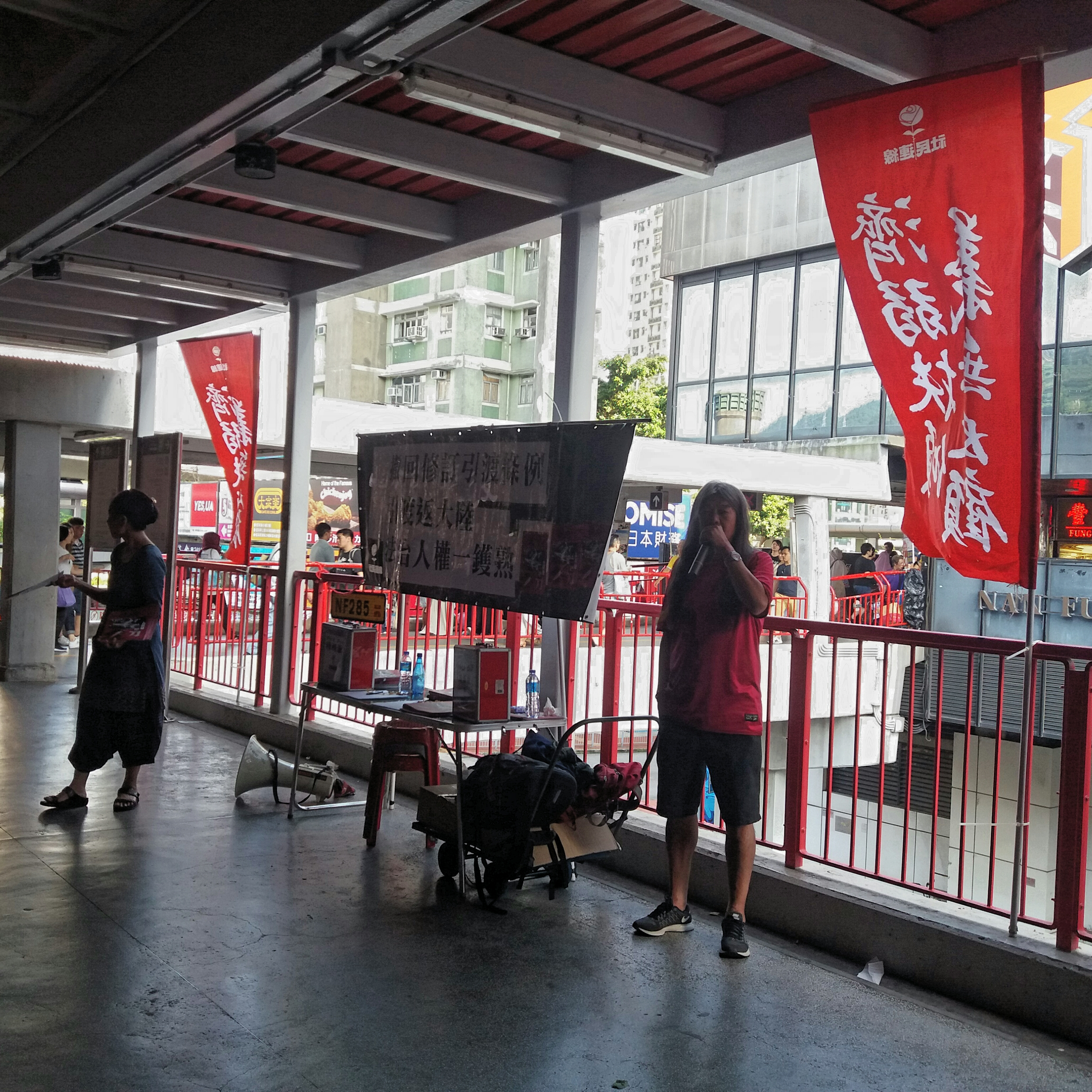 中文（香港）: 梁國雄在2019年5月於荃灣站A出口外擺設街站